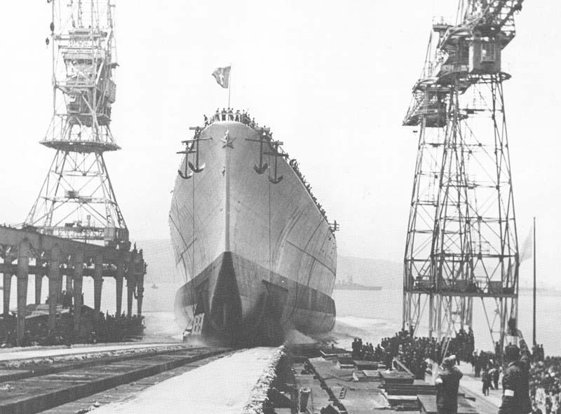 La corazzata Roma il giorno del varo (9 giugno 1940).